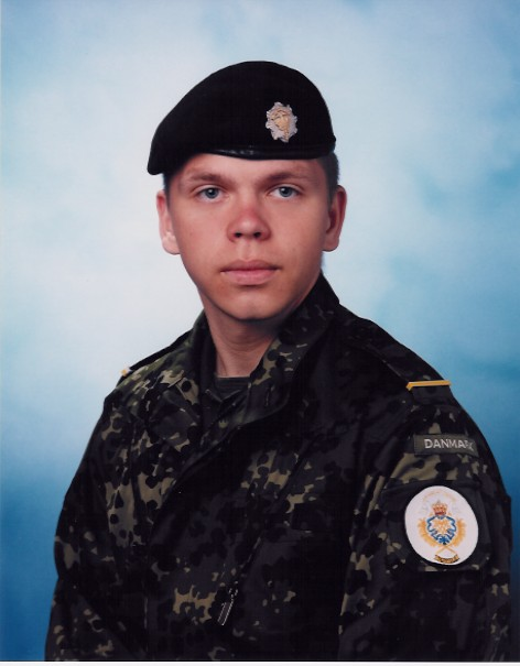 Billed af ung garder i 1997